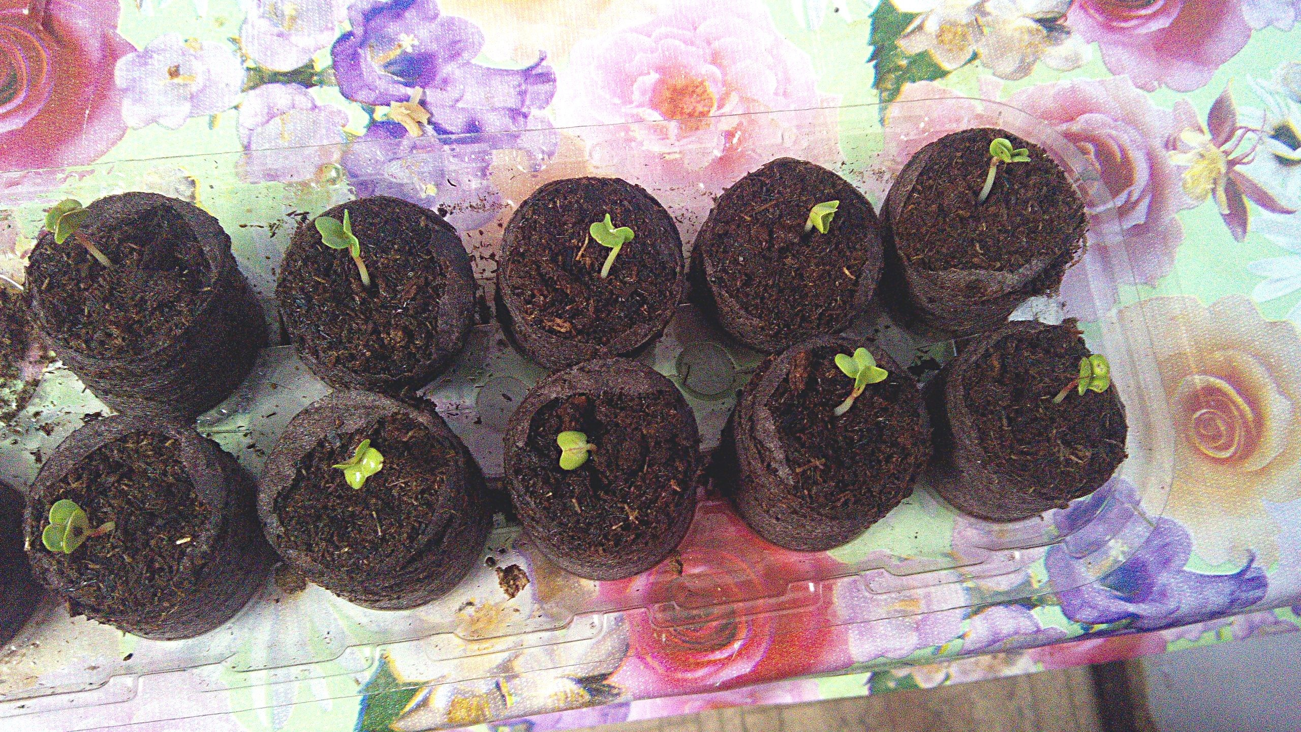 Торфяные таблетки с рассадой редиски на 4-ые сутки после посадки